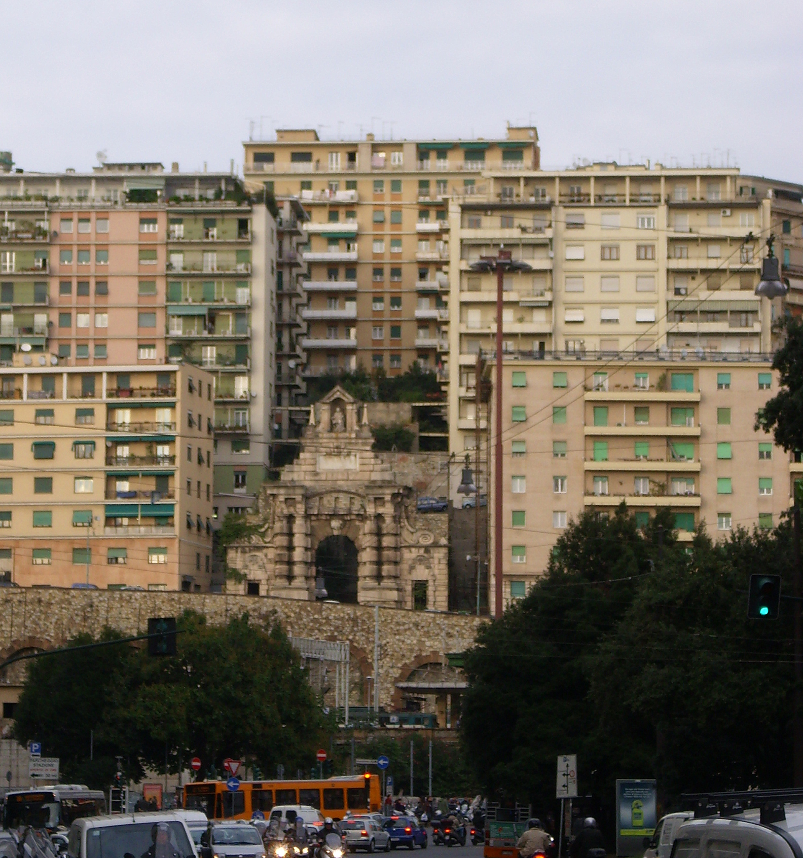 Porta Pila, ricostruita sopra la stazione di Genova Brignole e ormai circondata da nuovi edifici